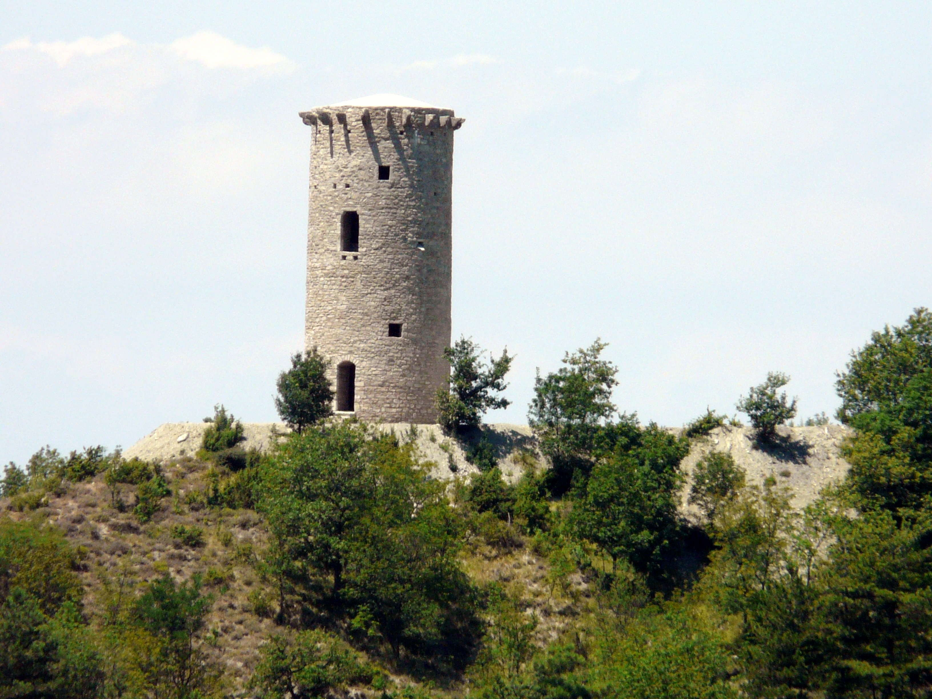 Il castello di Grondona, Piemonte, Italia